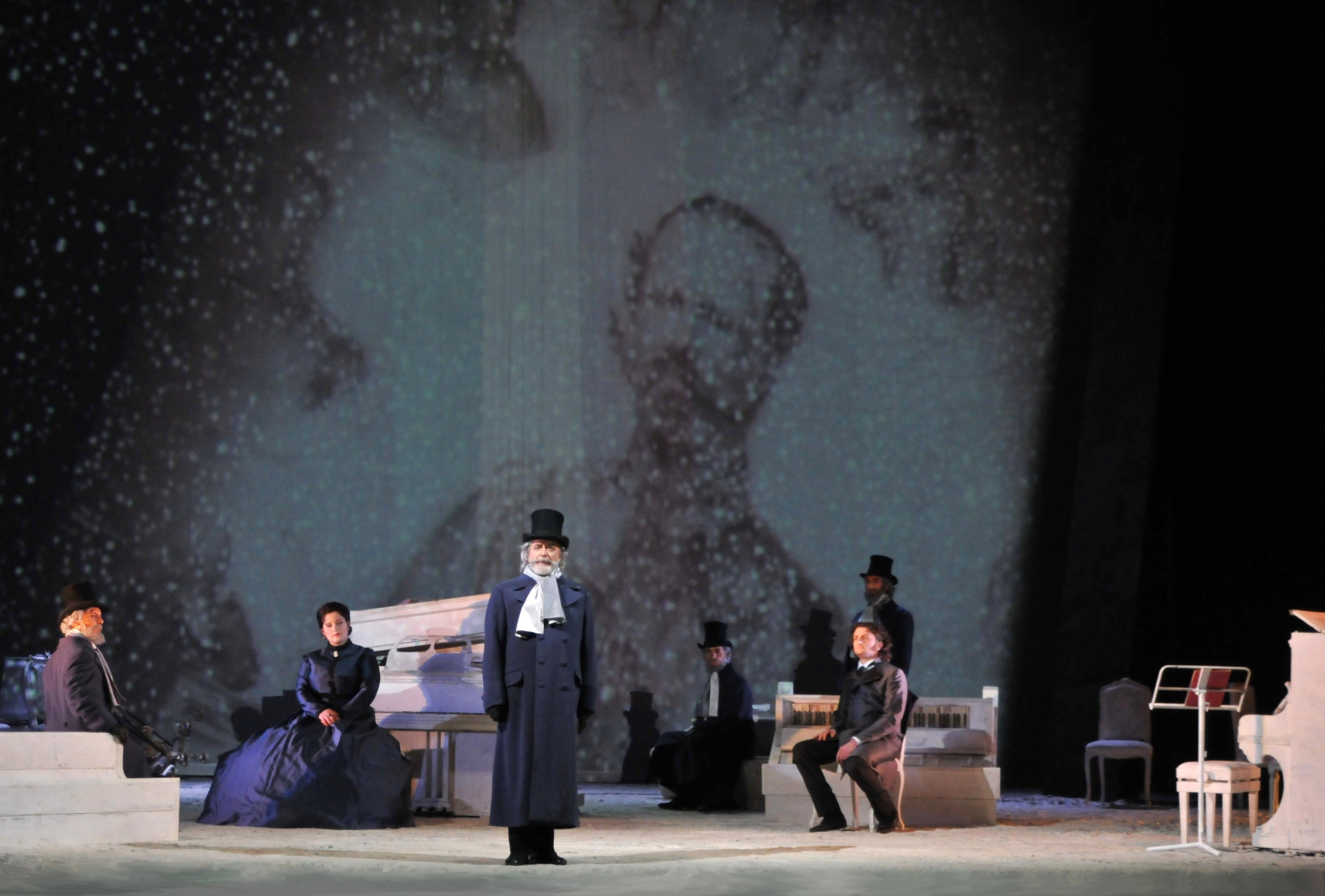 RISORGIMENTO!, Opera in un atto, Libretto di Dario Oliveri, Musica di Lorenzo Ferrero Opera realizzata in occasione della celebrazione per i 150 anni dell'Unità d'Italia Coproduzione Fondazione Teatro Comunale di Bologna, Fondazione Teatro Comunale di Modena